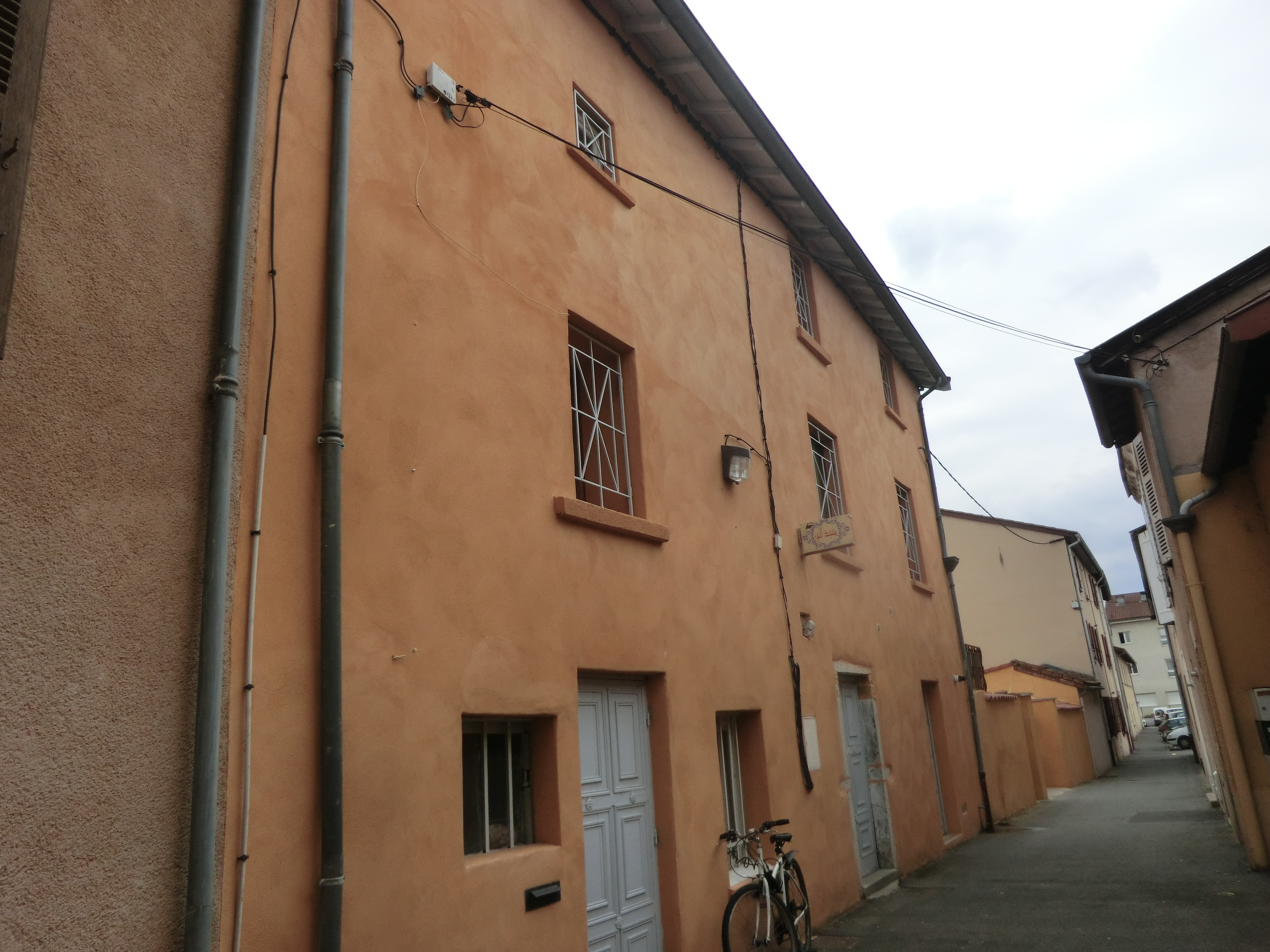 Mosquée de Belleville (Rhône).